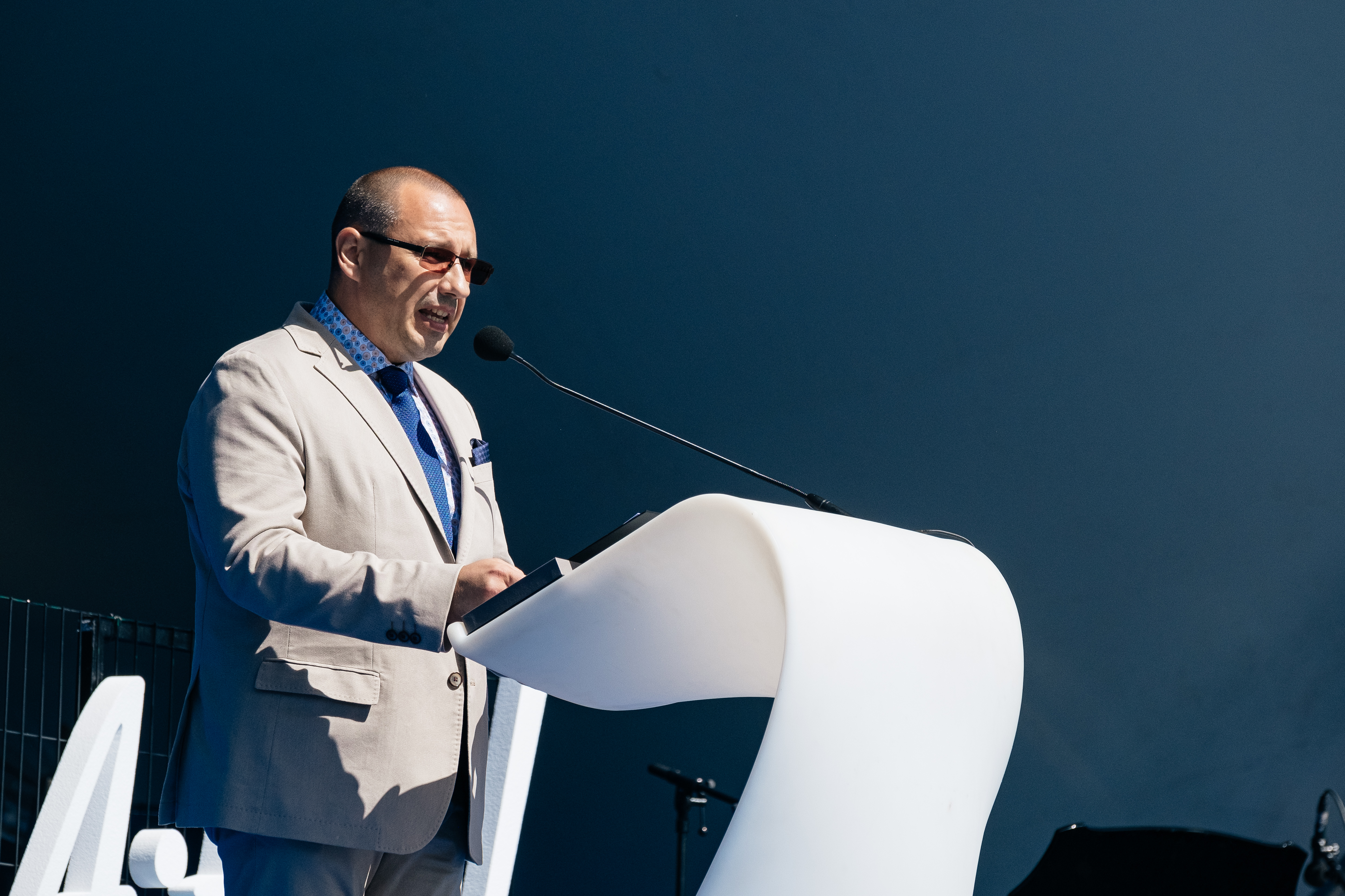 Arkadi Popov kõnelemas eriolukorra lahendamisel abiks olnutele korraldatud tänuüritusel.